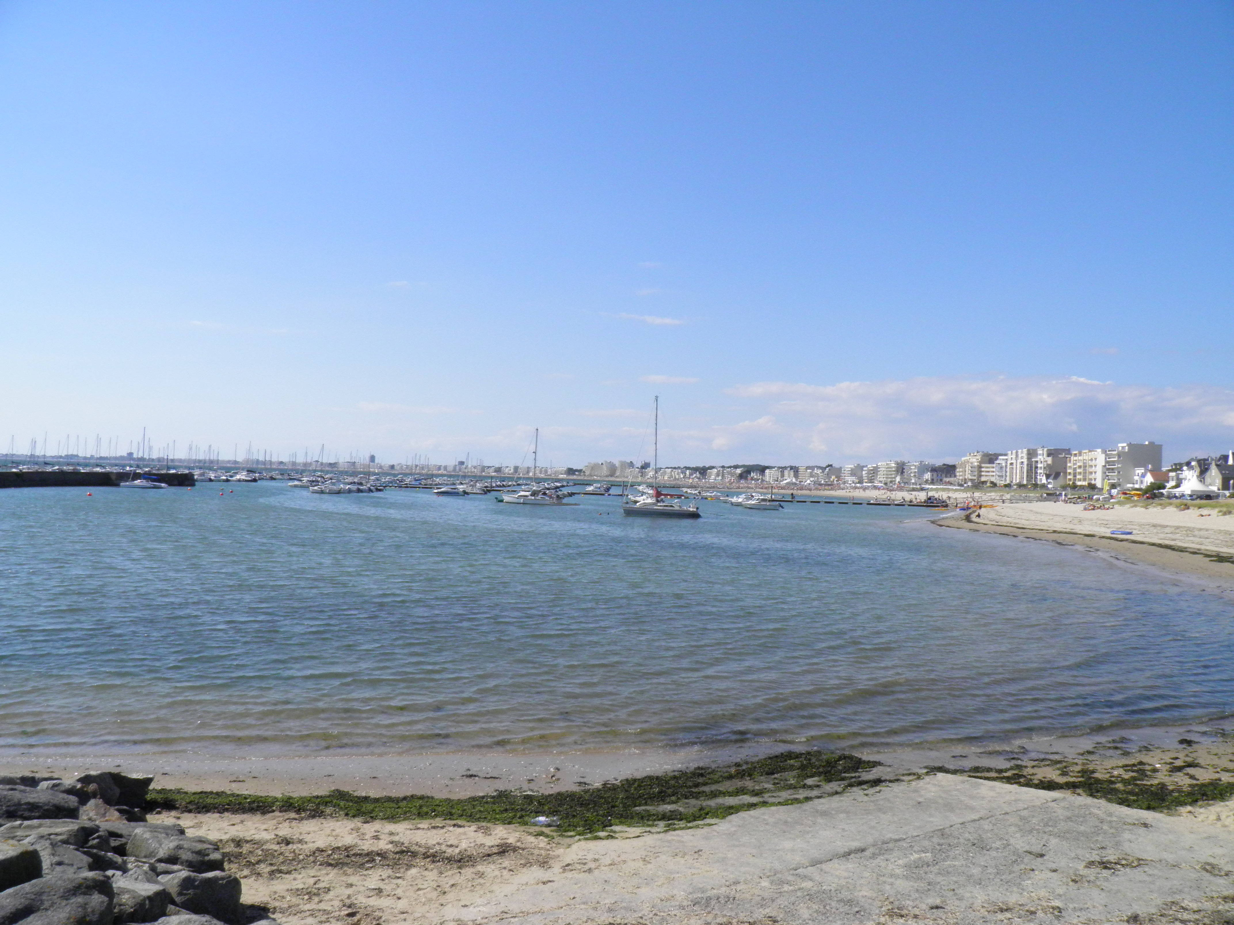 Le port d'échouage de Pornichet, à l'extrémité orientale de la baie du Pouliguen. Bordant la baie, à droite de l'image, la plage des Libraires (toujours à Pornichet), qui se prolonge, au loin et à gauche, par celle de La Baule (Loire-Atlantique, France).